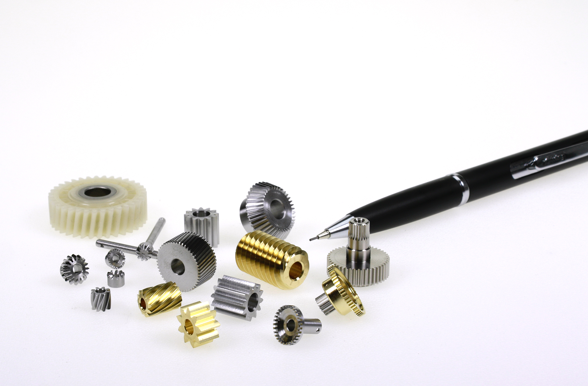 Lots de pièces, engrenages microtechniques